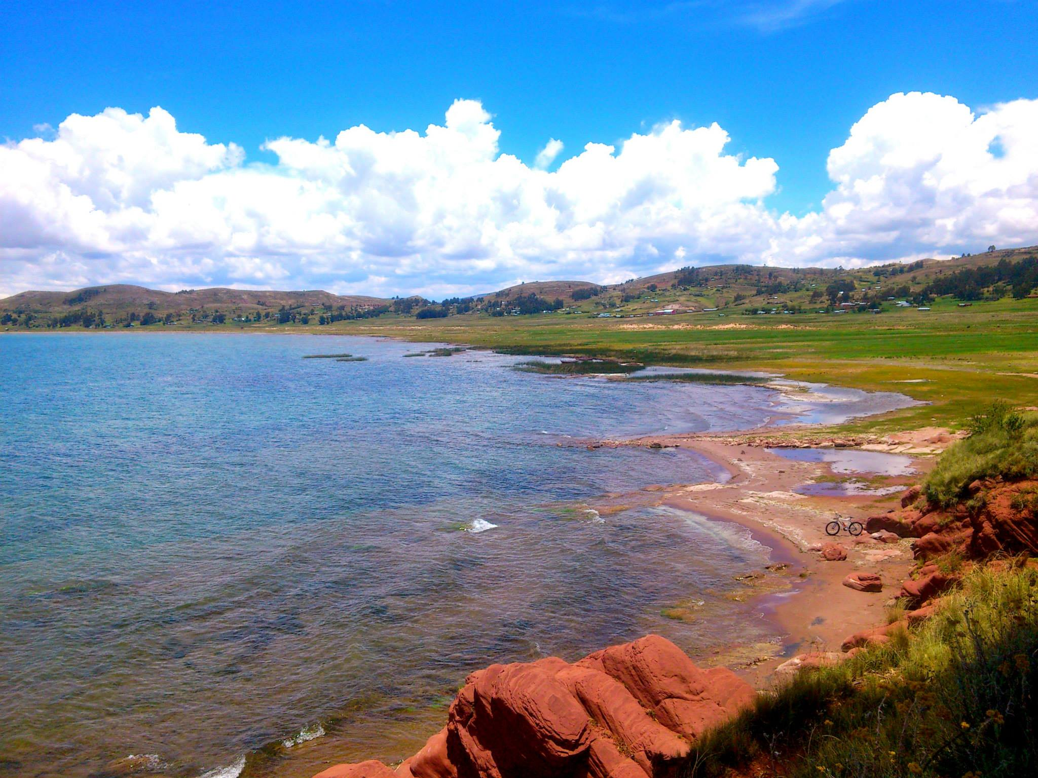 Platería Puno Peru